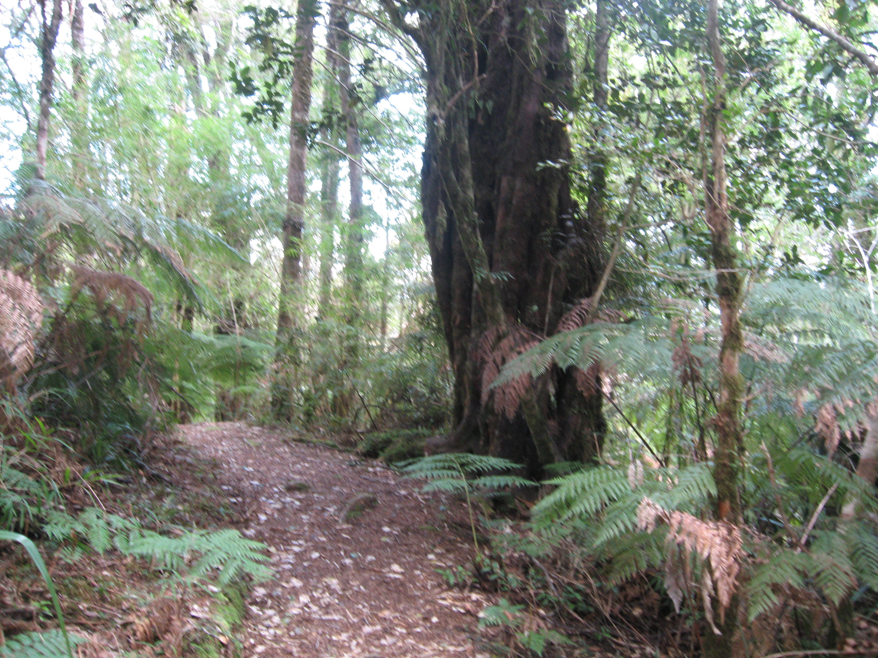 Bosque valdiviano en el parque Oncol, región de Los Ríos, Chile